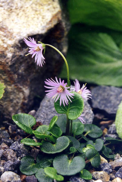 Soldanella alpina